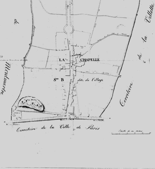 Plan de la commune de La Chapelle Saint-Denis en 1814.